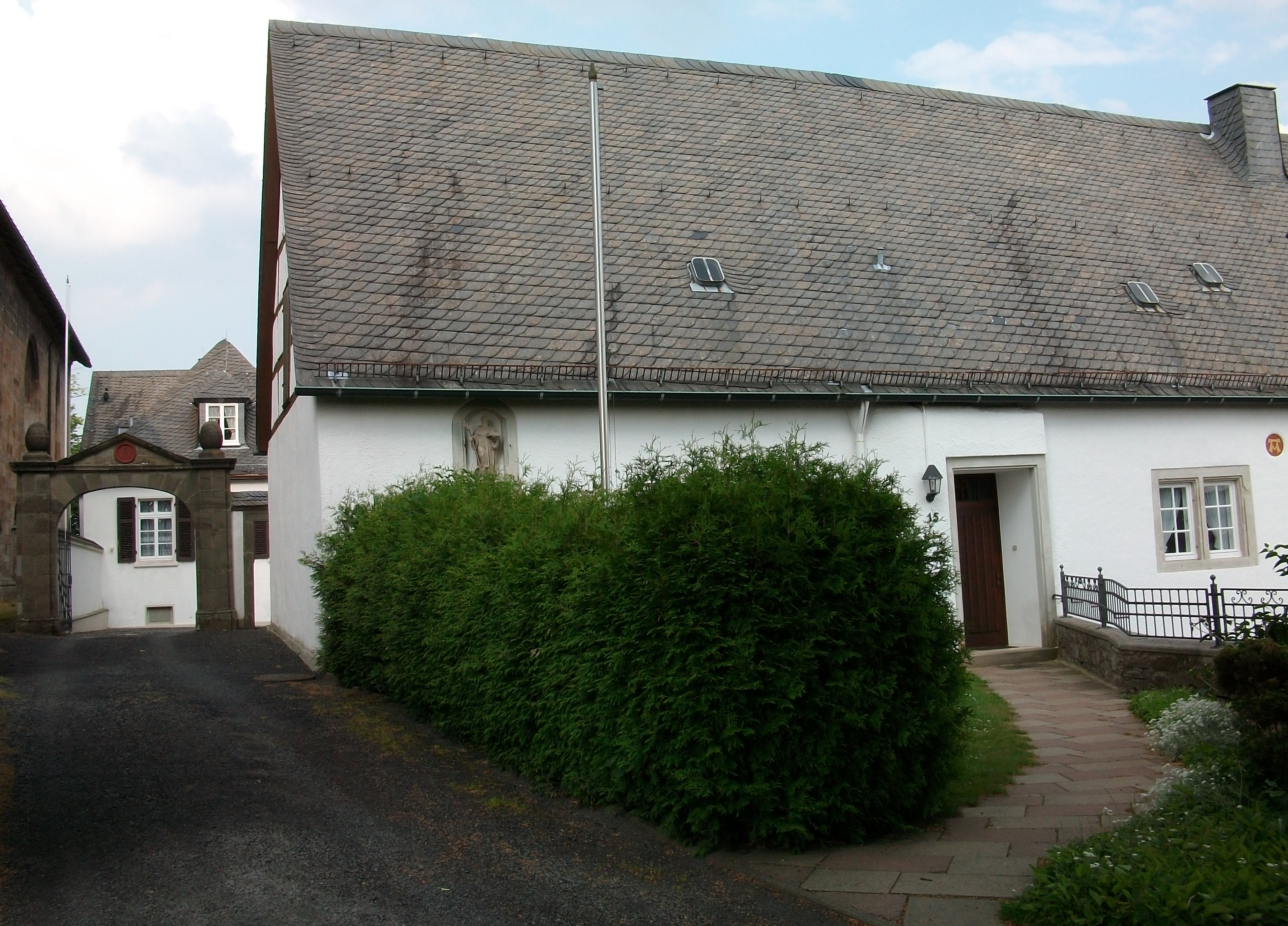 Obermarsberg ehemaliges Kloster, (Marsberg, Germany)